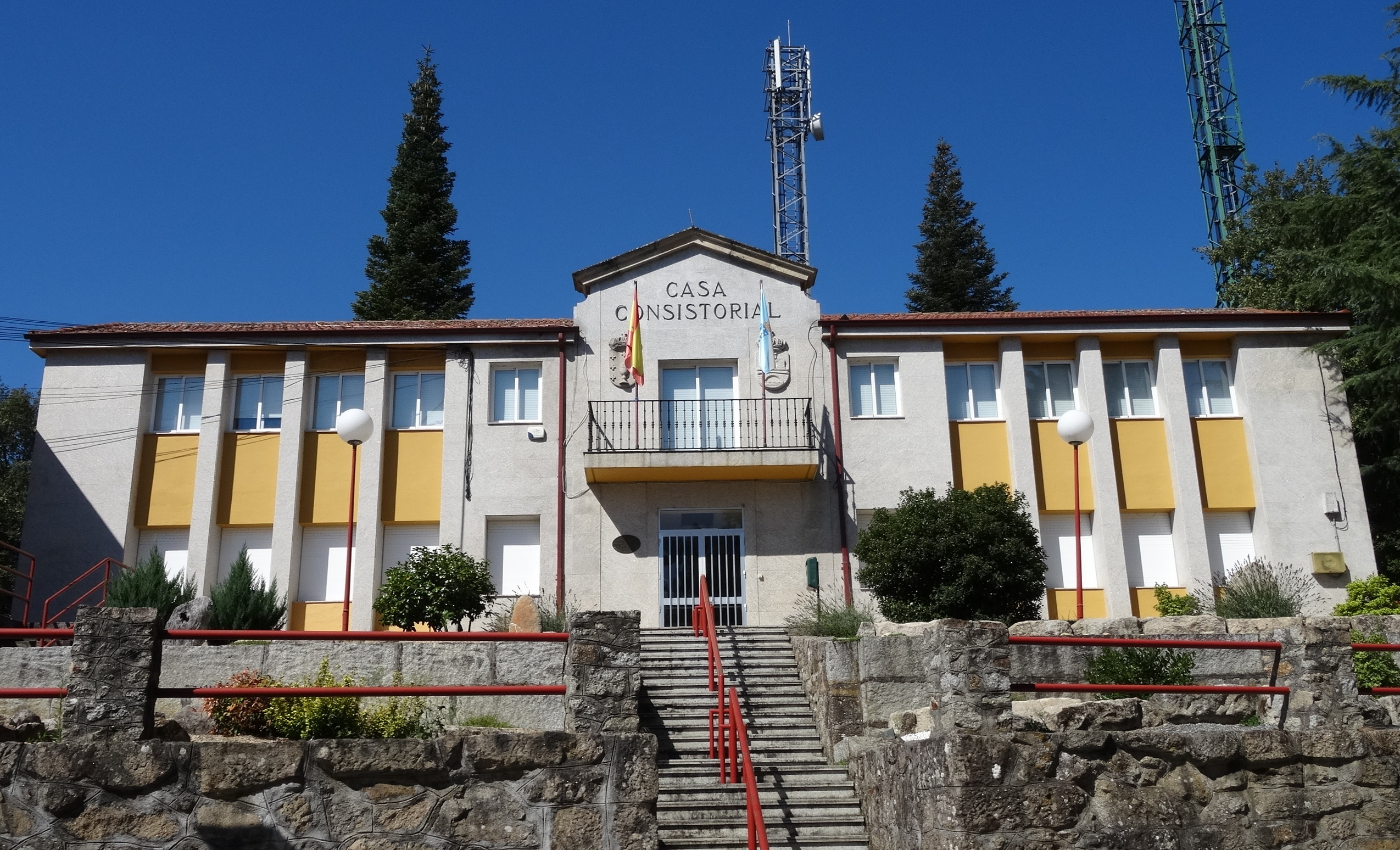 Casa do concello de Baños de Molgas.